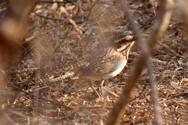 Brachypterolle à longue queue